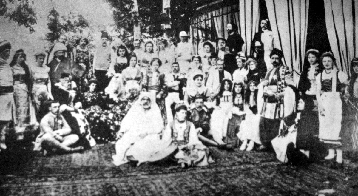 (مالکیت عمومی) تصویر معروف موسیو نوز بلژیکی که یکی از موجبات تحریک مردم برای قیام مشروطه شد